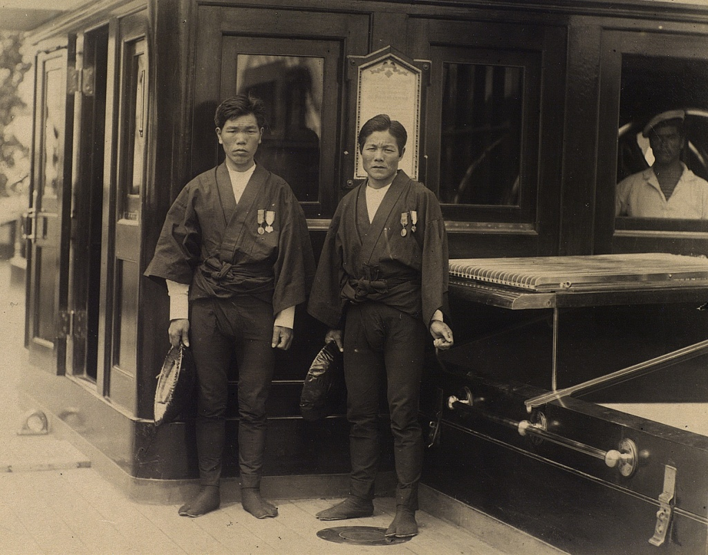 Рикши, спасшие Николая во время инцидента в Оцу (слева — Китагаити Ититаро, справа — Мукохата Дзисабуро) The men who saved Nicholas from death during the Otsu incident